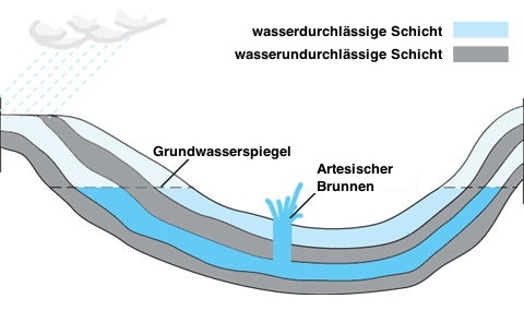 Darstellung eines artesischen Brunnens.